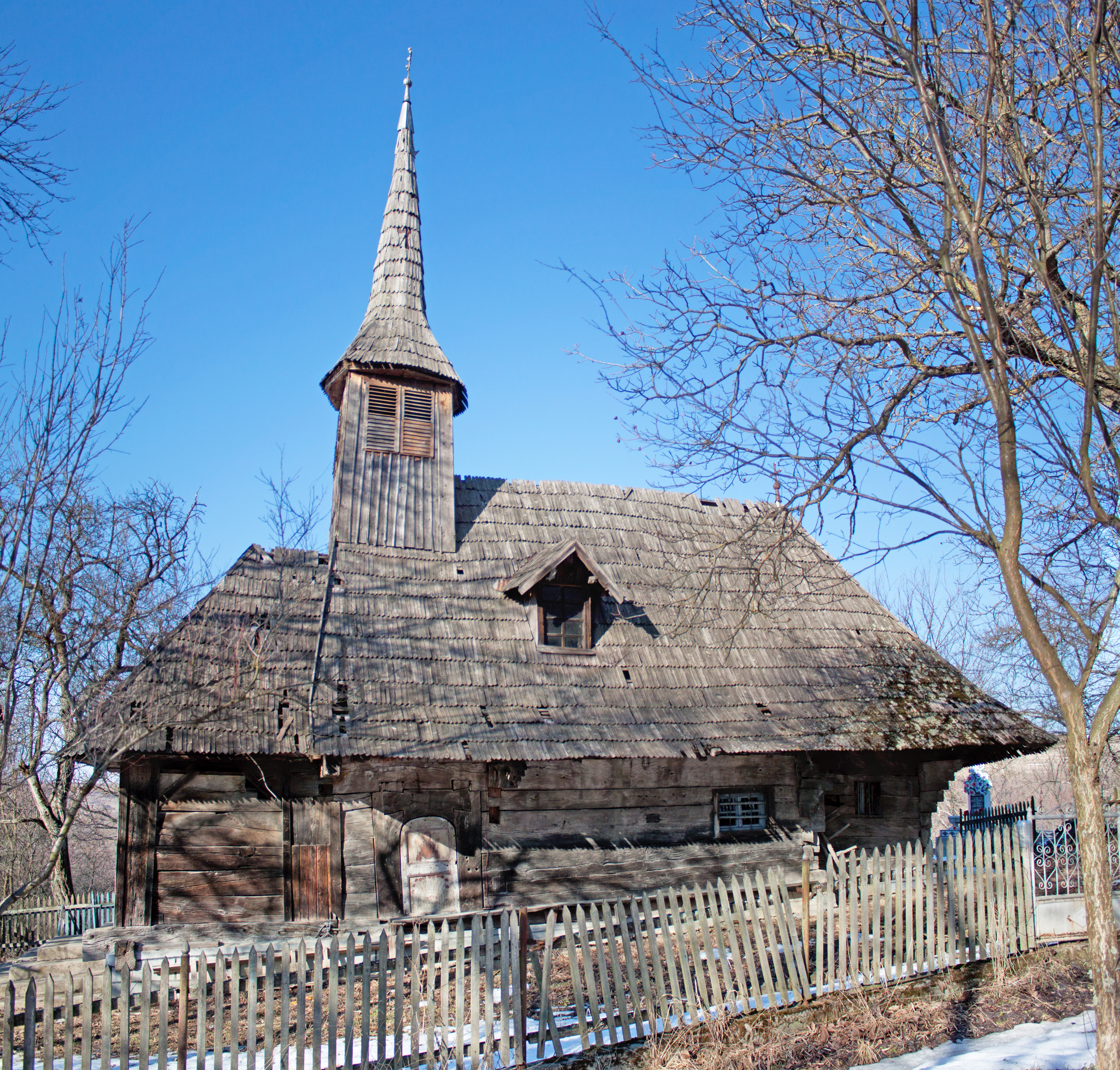 Biserica de lemn din Bocșița, secolul 18, județul Sălaj.